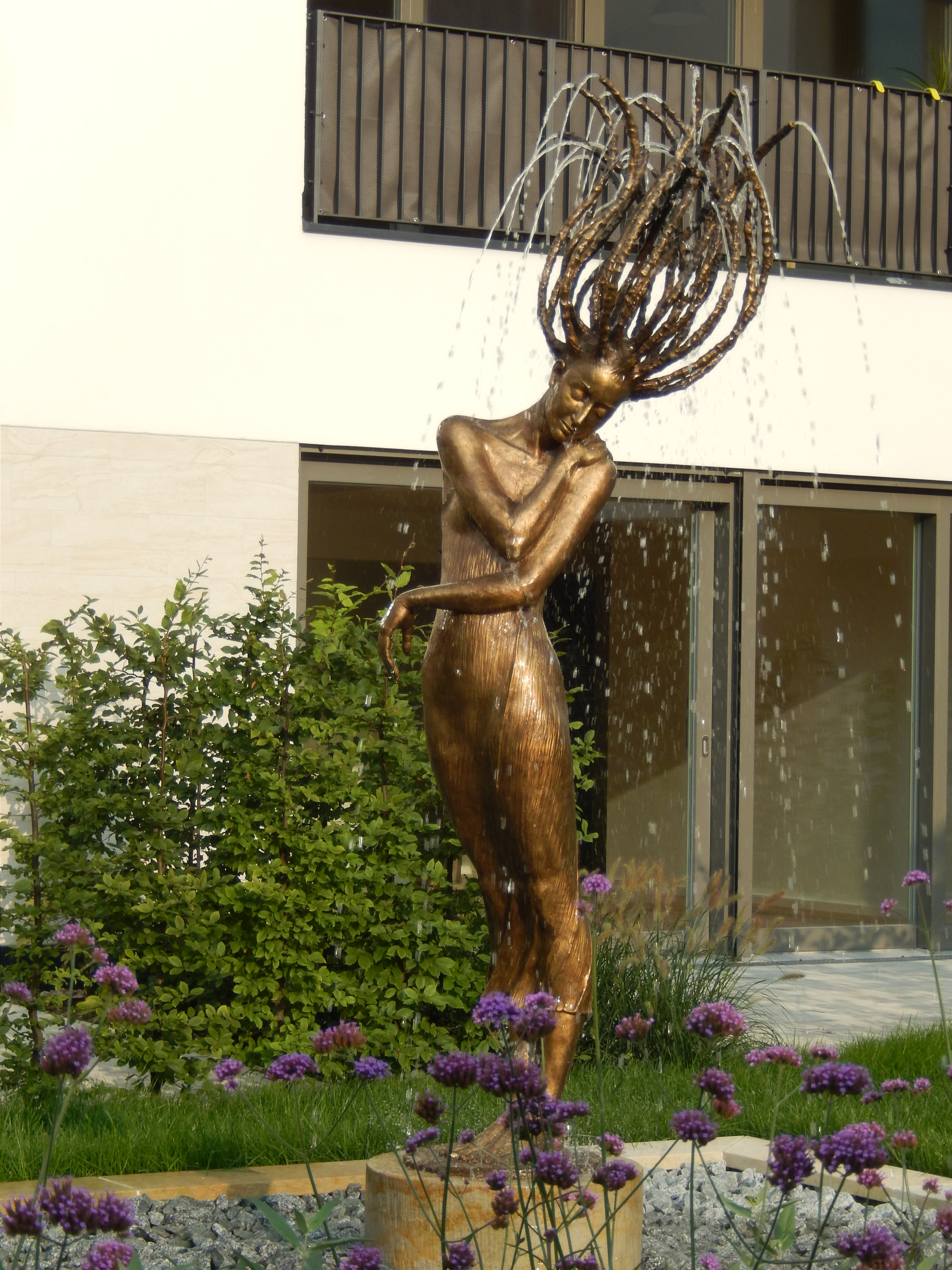 Dresden, Bergstraße 1-3, Brunnenfigur Primavera II von der Dresdner Bildhauerin Małgorzata Chodakowska